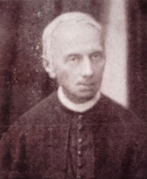 Domherr zu St. Martin in Preßburg und Gemeindepfarrer in Blumenthal (ebd.)